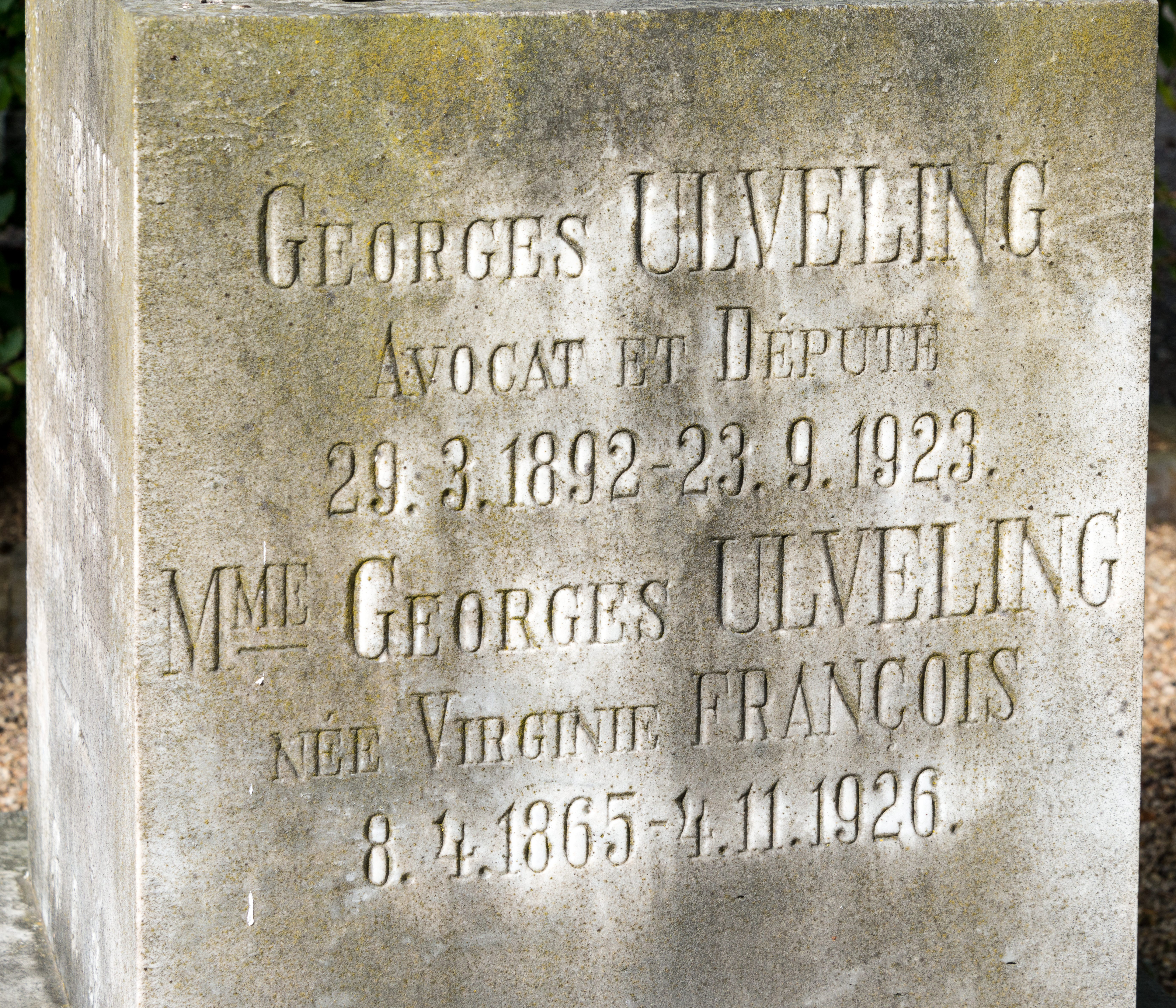 Grafstee Georges ("Jemmy") Ulveling um Nikloskierfecht.